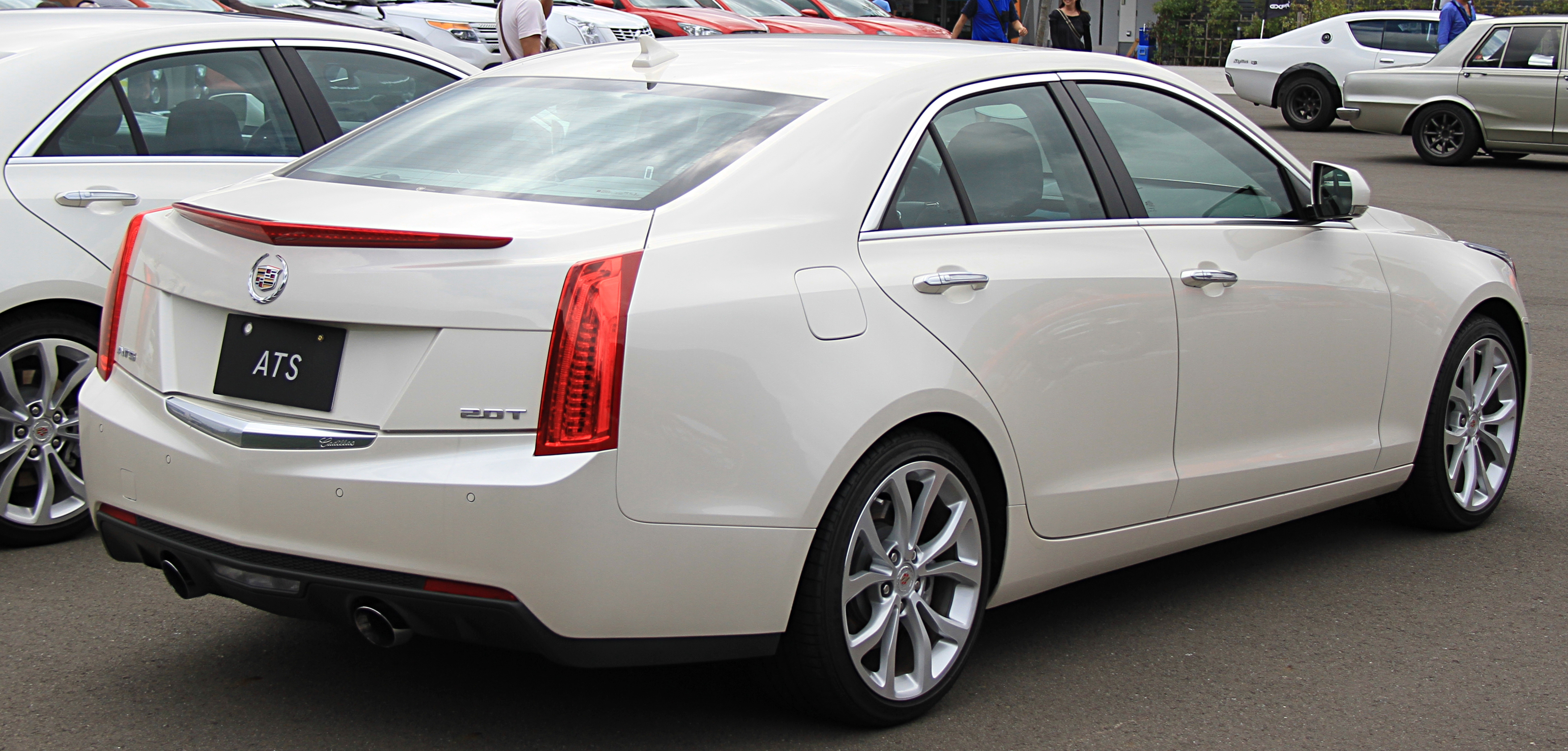 Cadillac ATS